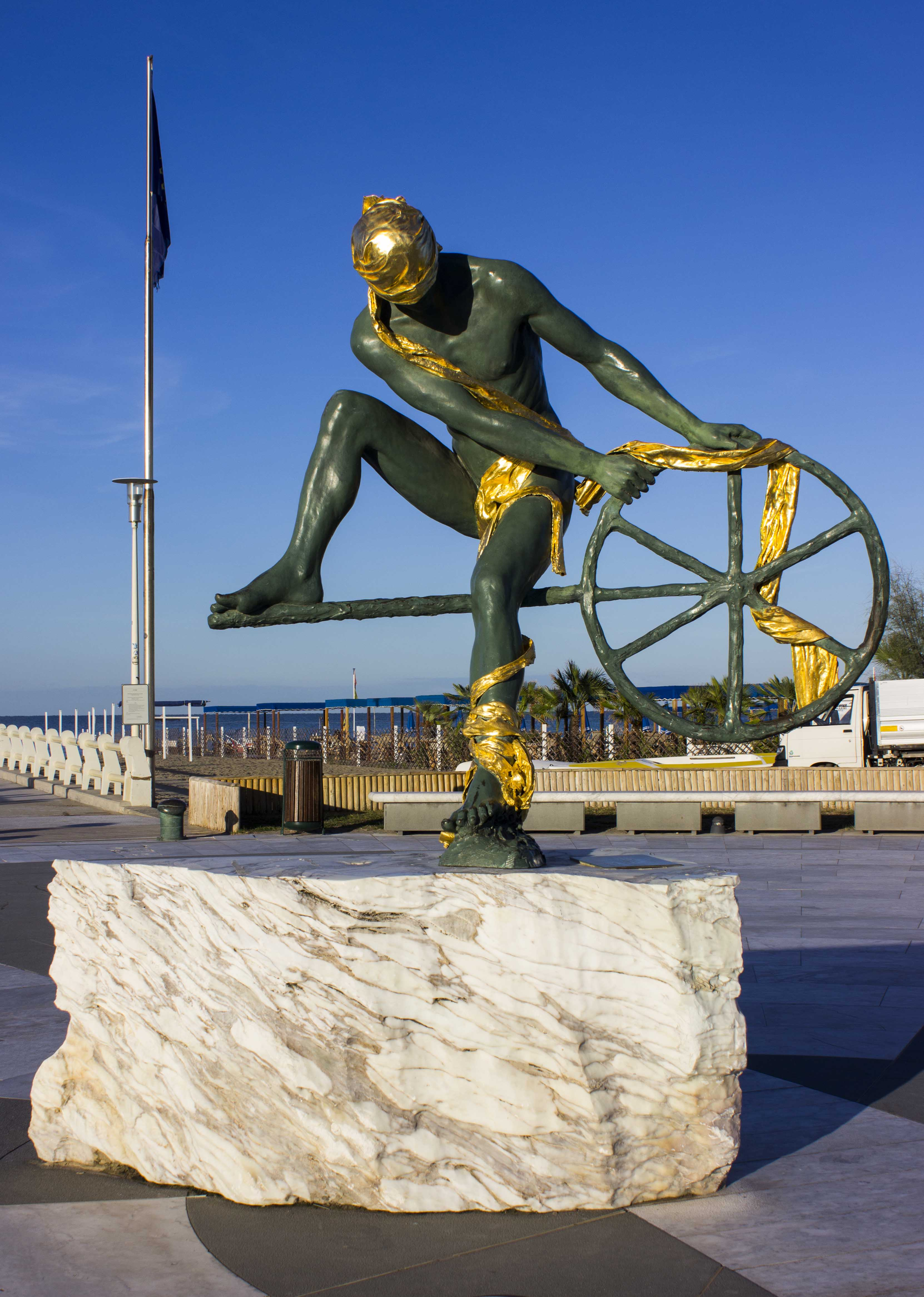 controvento This is a photo of a monument which is part of cultural heritage of Italy.